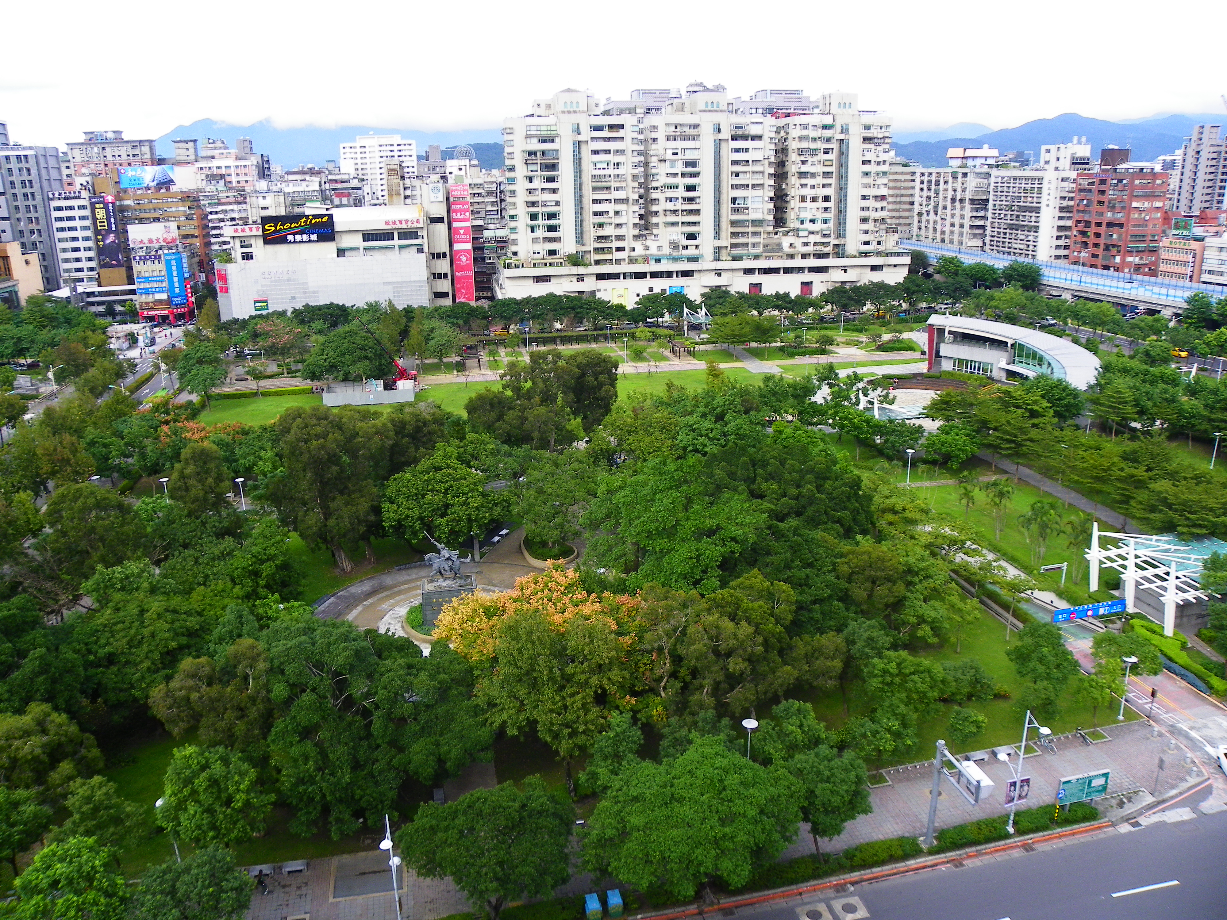 林森公園北向鳥瞰。